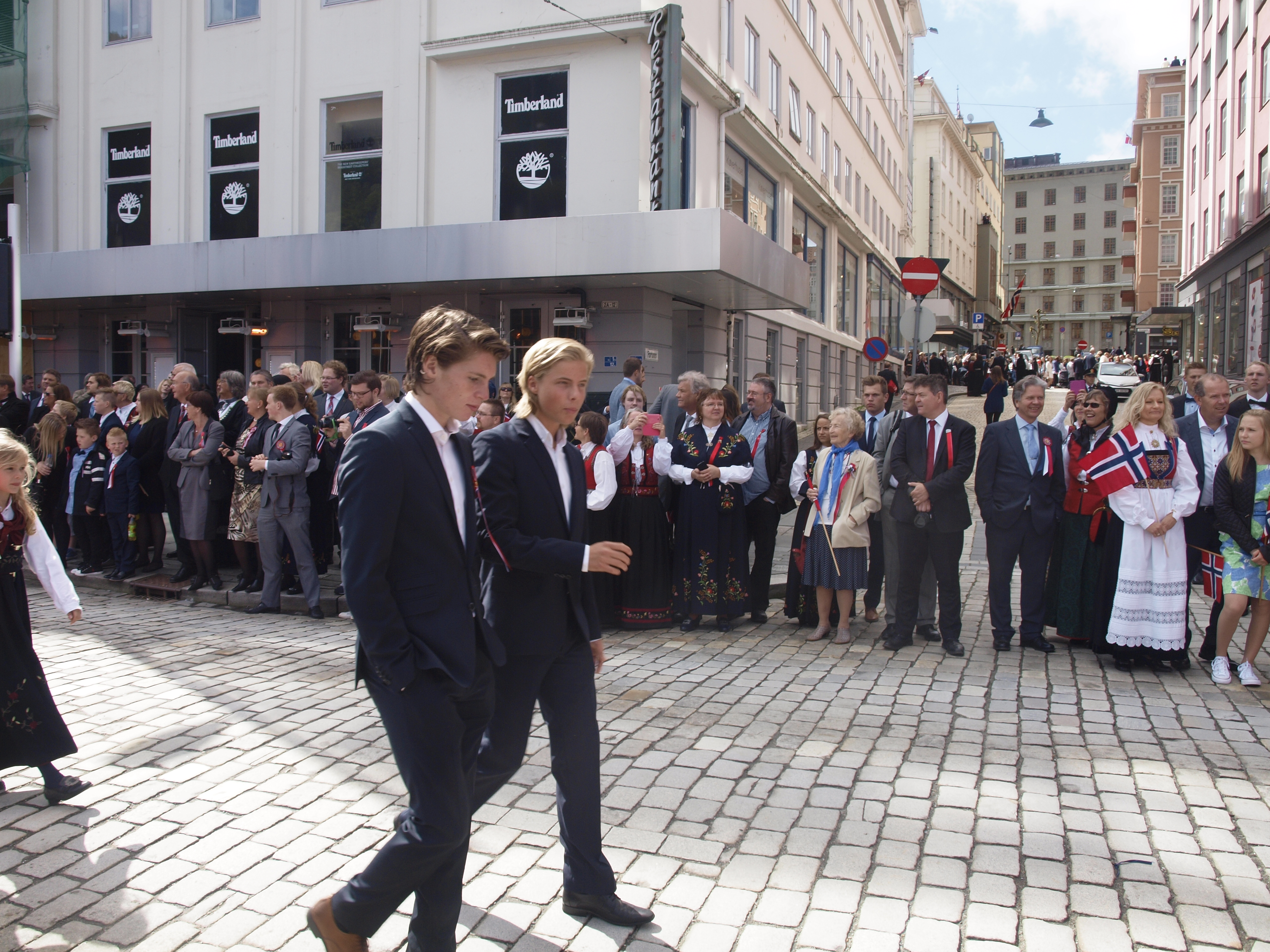 Kristoffer Skaanes in 2014